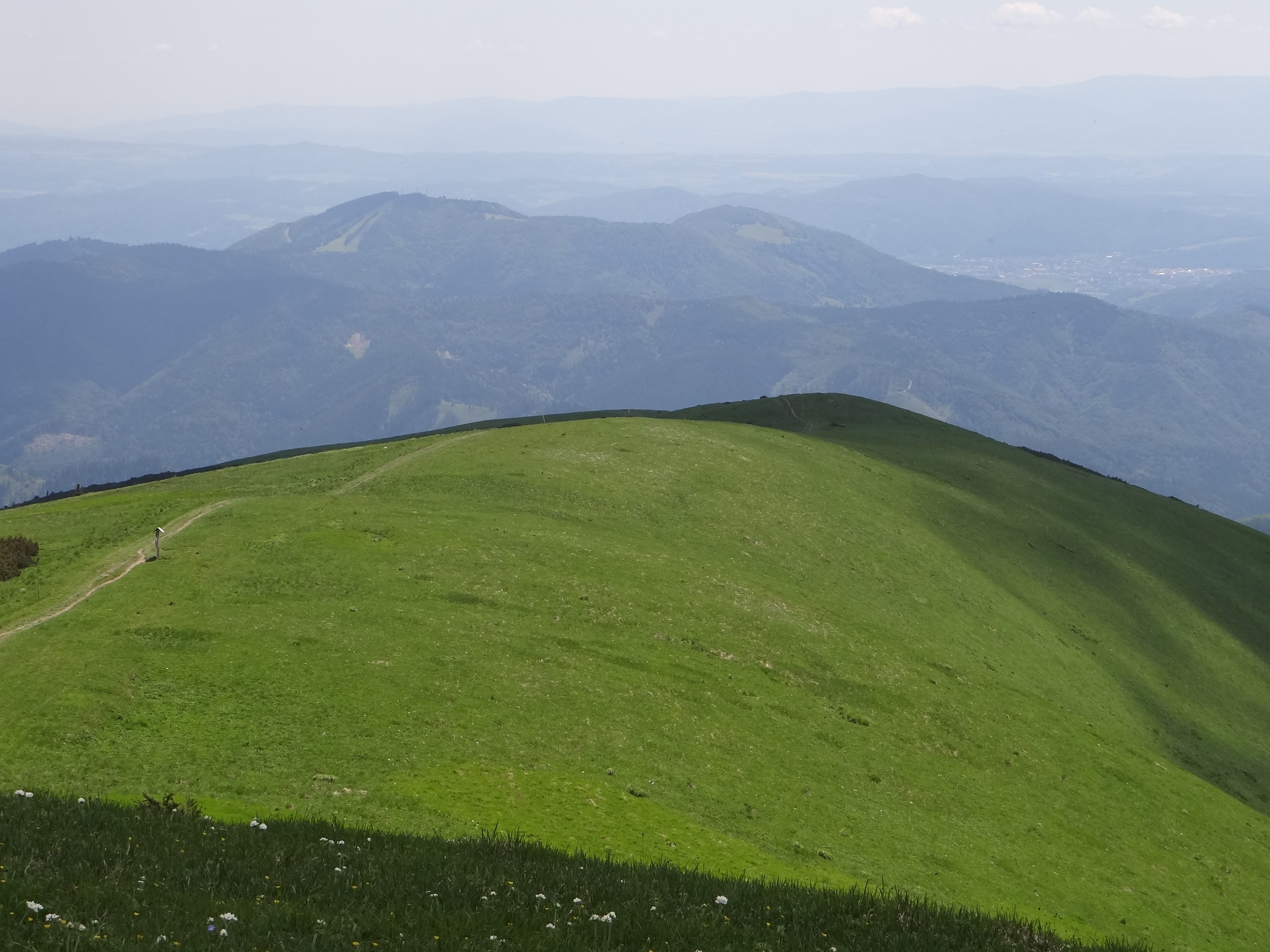 Malá Krížna